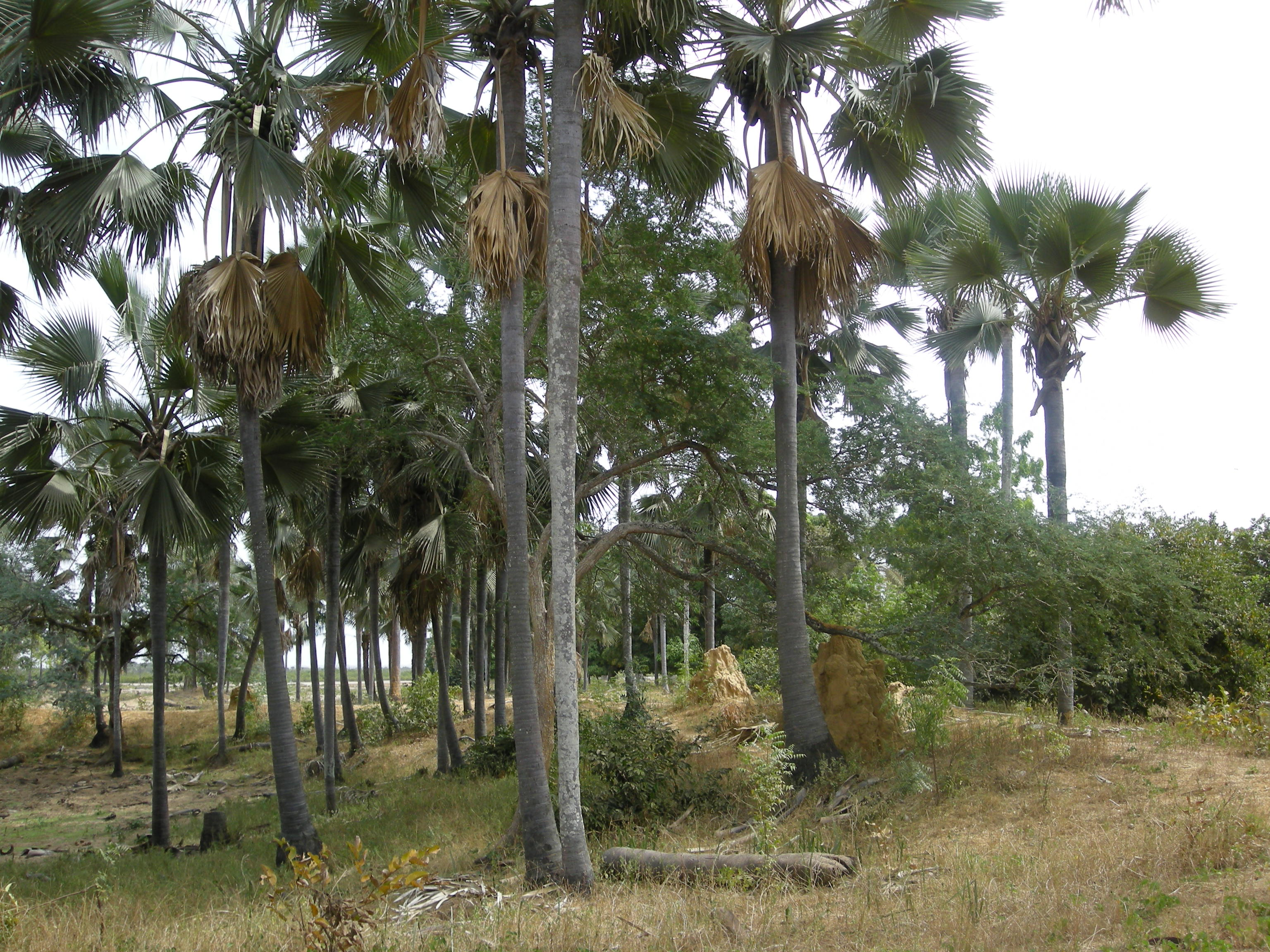 Rôniers et termitières : paysage typique de Casamance (Sénégal) à Séléki